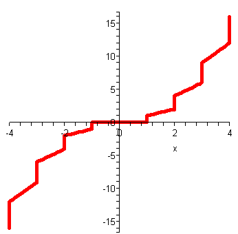 oneven fucntie zelf, Maple 9.5